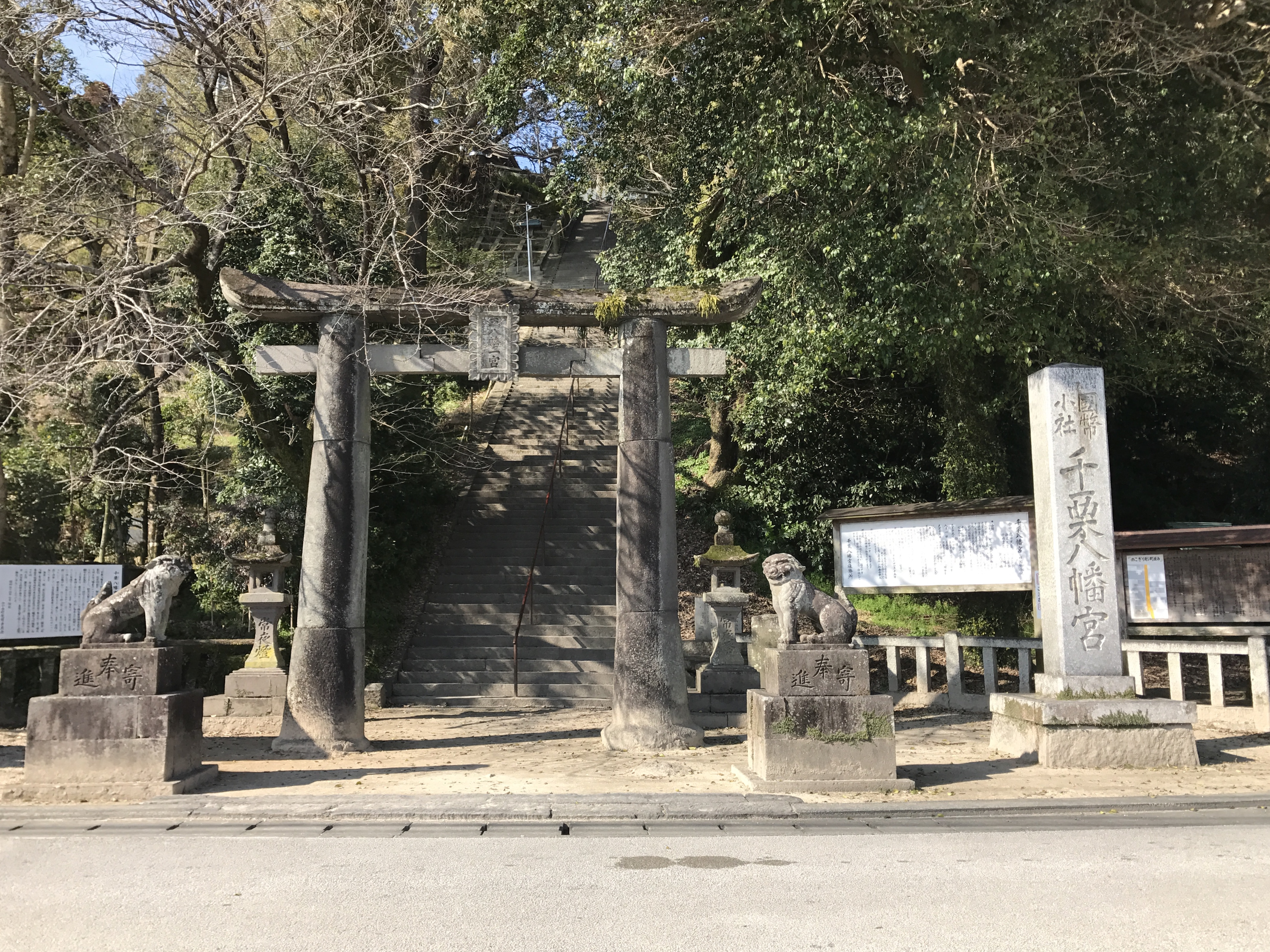 千栗八幡宮の鳥居と社名標